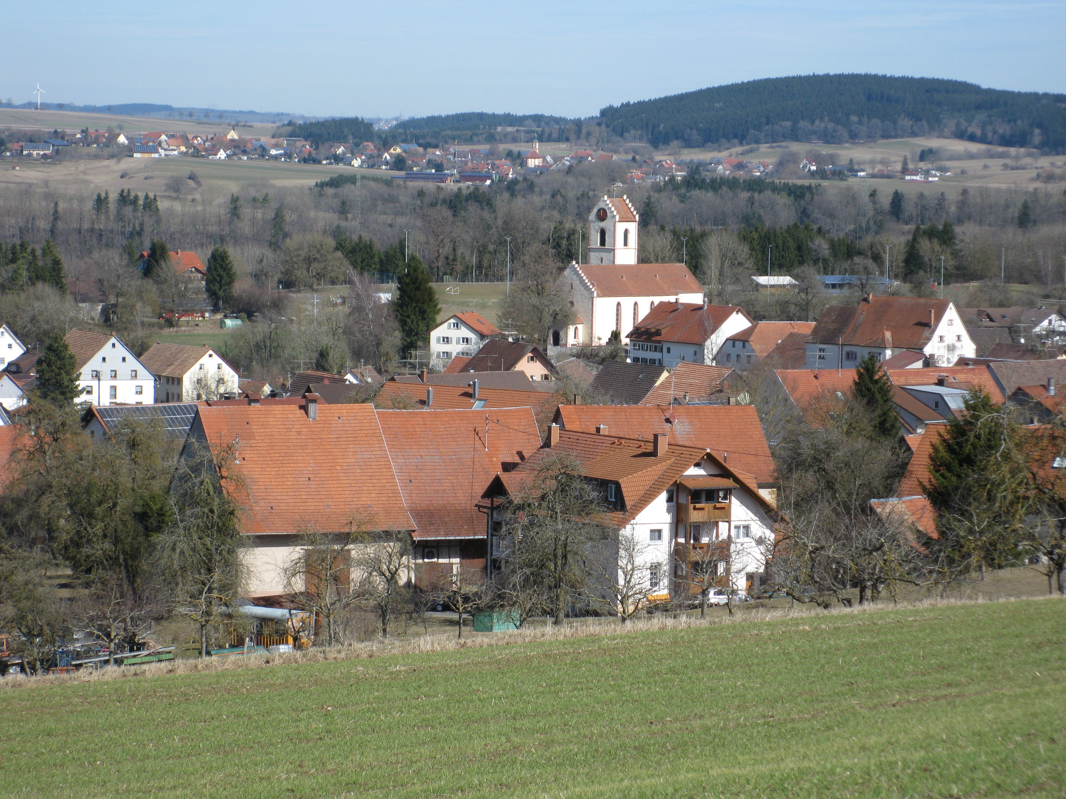 Gemeinde Wutach, Hauptort Ewattingen